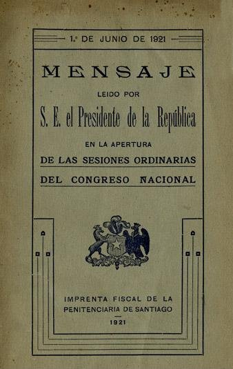 Mensaje leído por el Presidente de la República de Chile en la apertura de las sesiones ordinarias del Congreso Nacional de 1921. Santiago de Chile: Imprenta Fiscal de la Penitenciaría de Santiago, 1921.